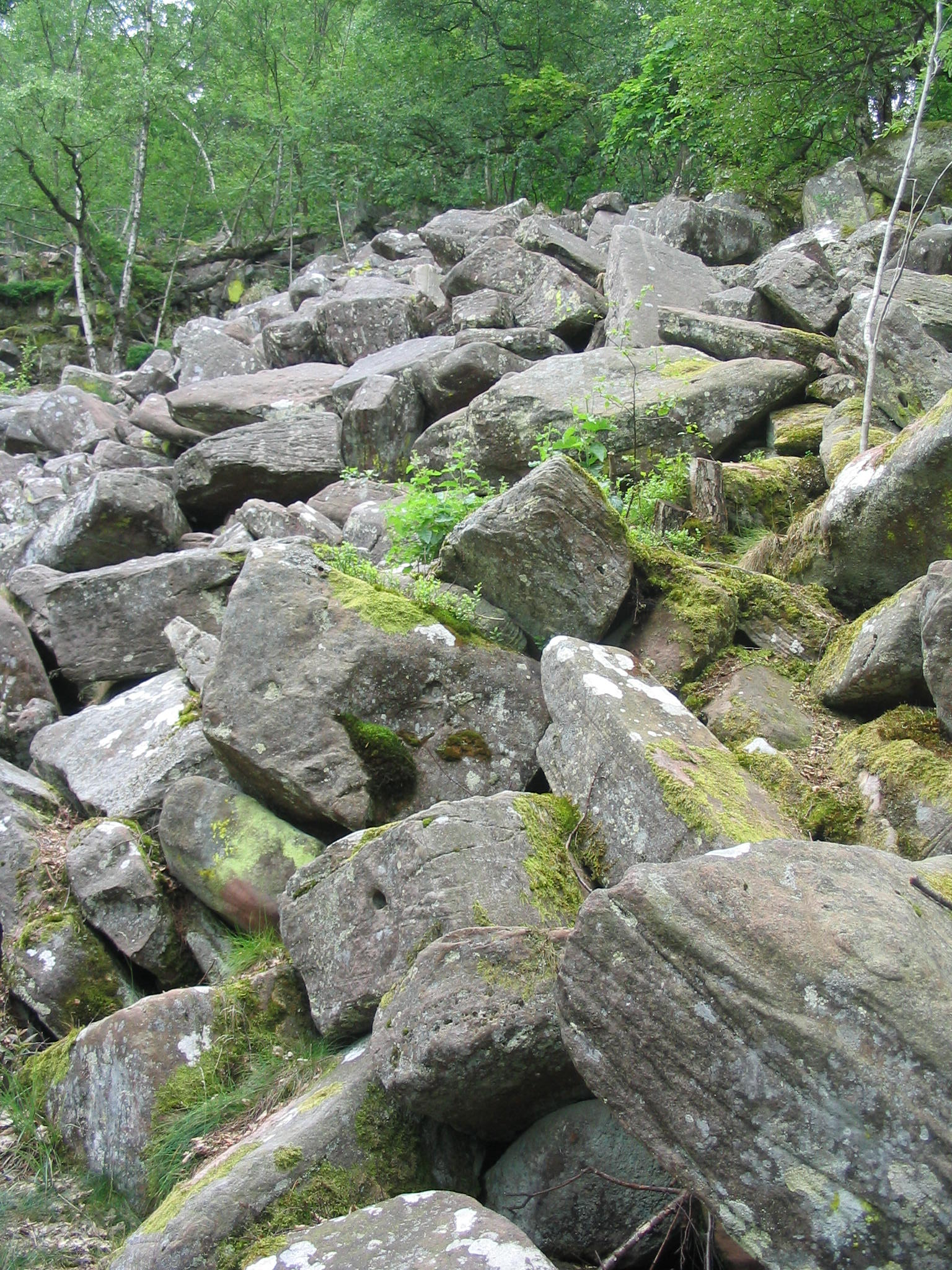 Buntsandstein-Felsenmeer am Königstuhl-Auerhahnenkopf-Nordhang bei Heidelberg (Odenwald)